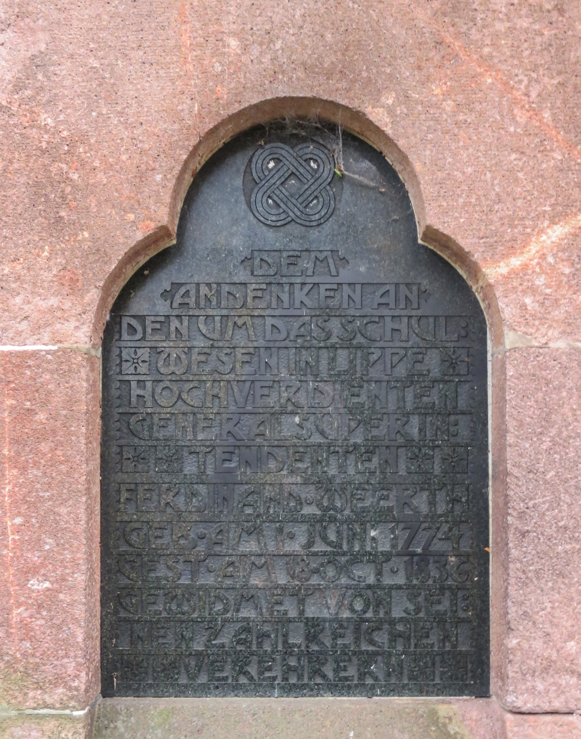 Ferdinand-Weerth-Denkmal auf dem Weerthplatz in Detmold